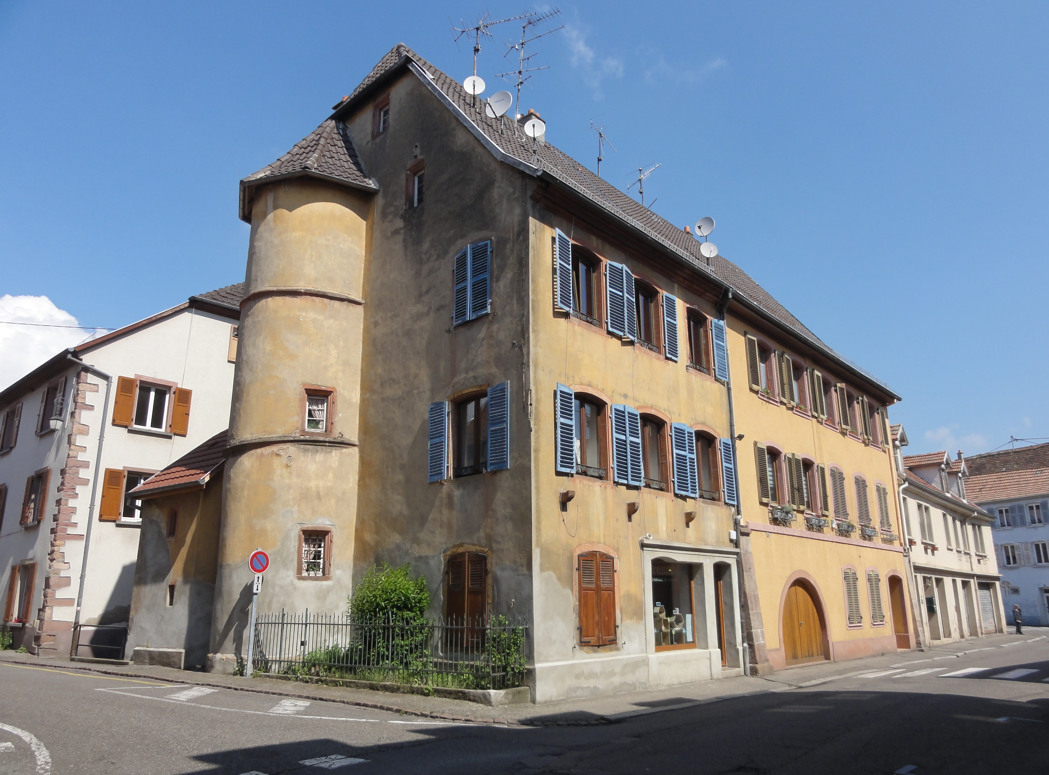 Alsace, Soultz-Haut-Rhin, Maison (XVIe-XVIIIe), 38 rue Jean-Jaurès. .